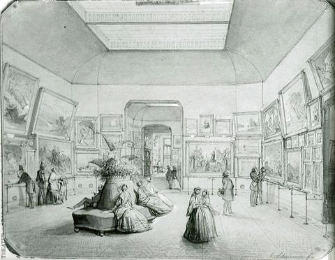 Caspar Nepomuk Scheuren, Die frühere Kunstausstellung von Eduard Schulte. Eduard Schulte (1817-1890) war ein Düsseldorfer Kunsthändler. Sein Sohn Hermann (1850-1940) eröffnete in Berlin Unter den Linden einen Kunsthandel.